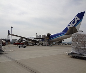 北九州空港の日本貨物航空